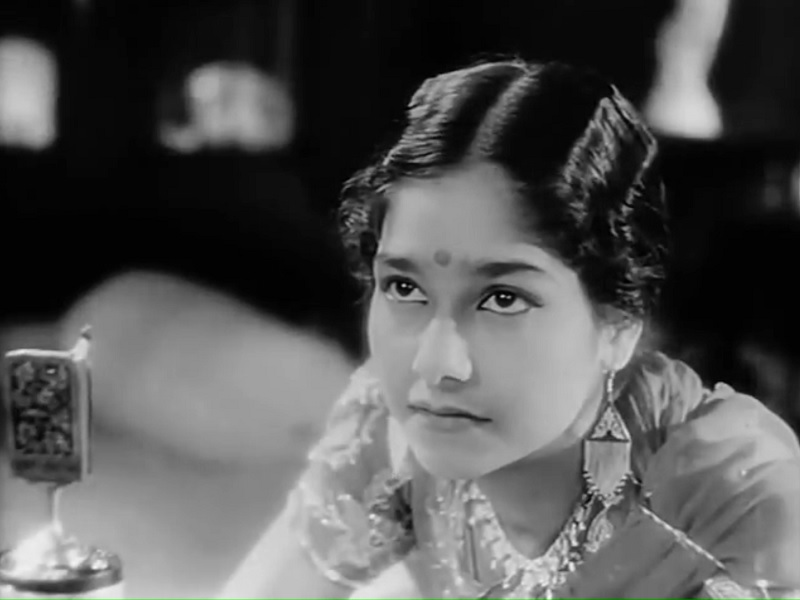 Rajkumari dans Devdas (version hindi) (1935)